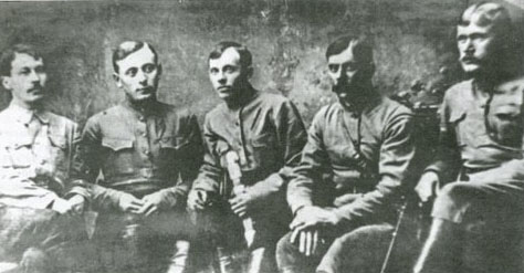 Командование 2-й повстанческой армией. Слева - Бошкарёв, Митрофанович, Антонов, Токмаков, Силянский.